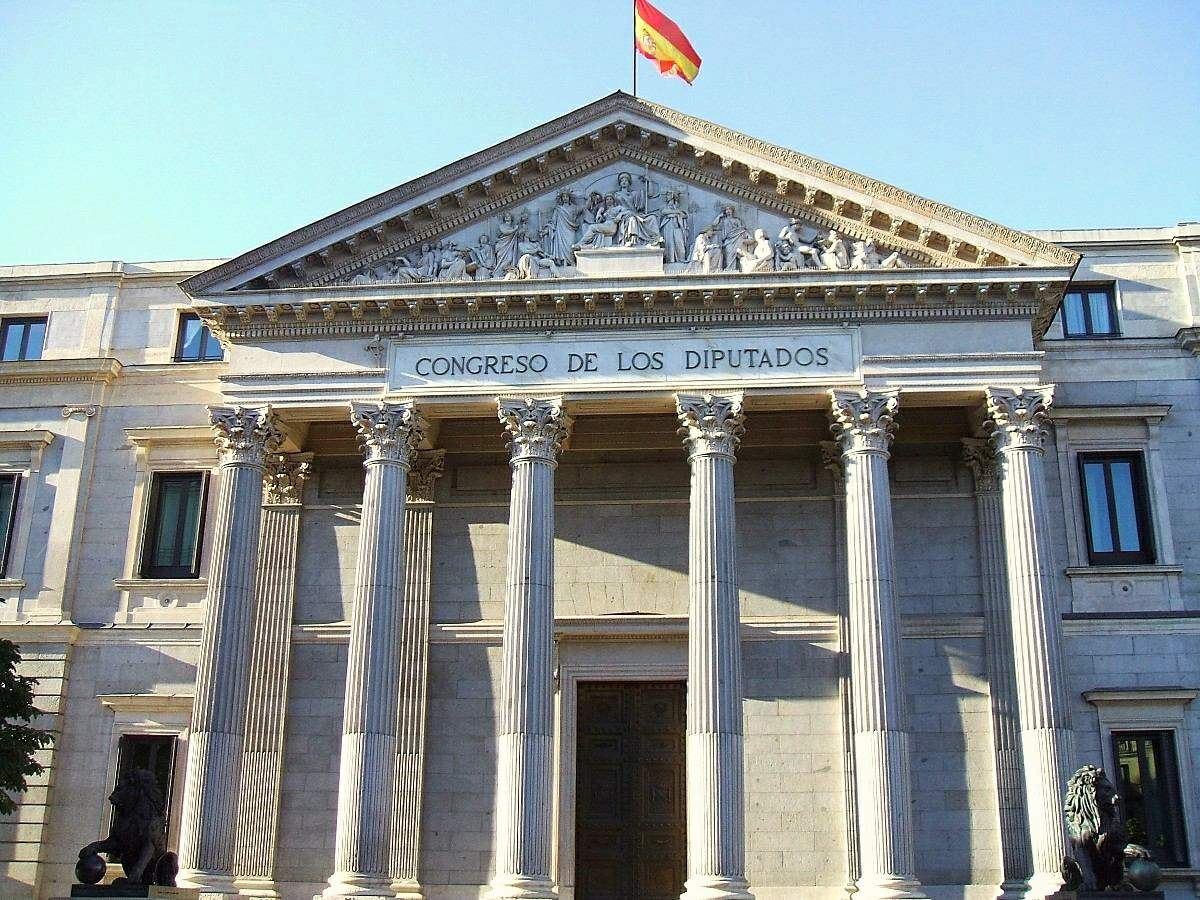 Madrid - Congreso de Diputados